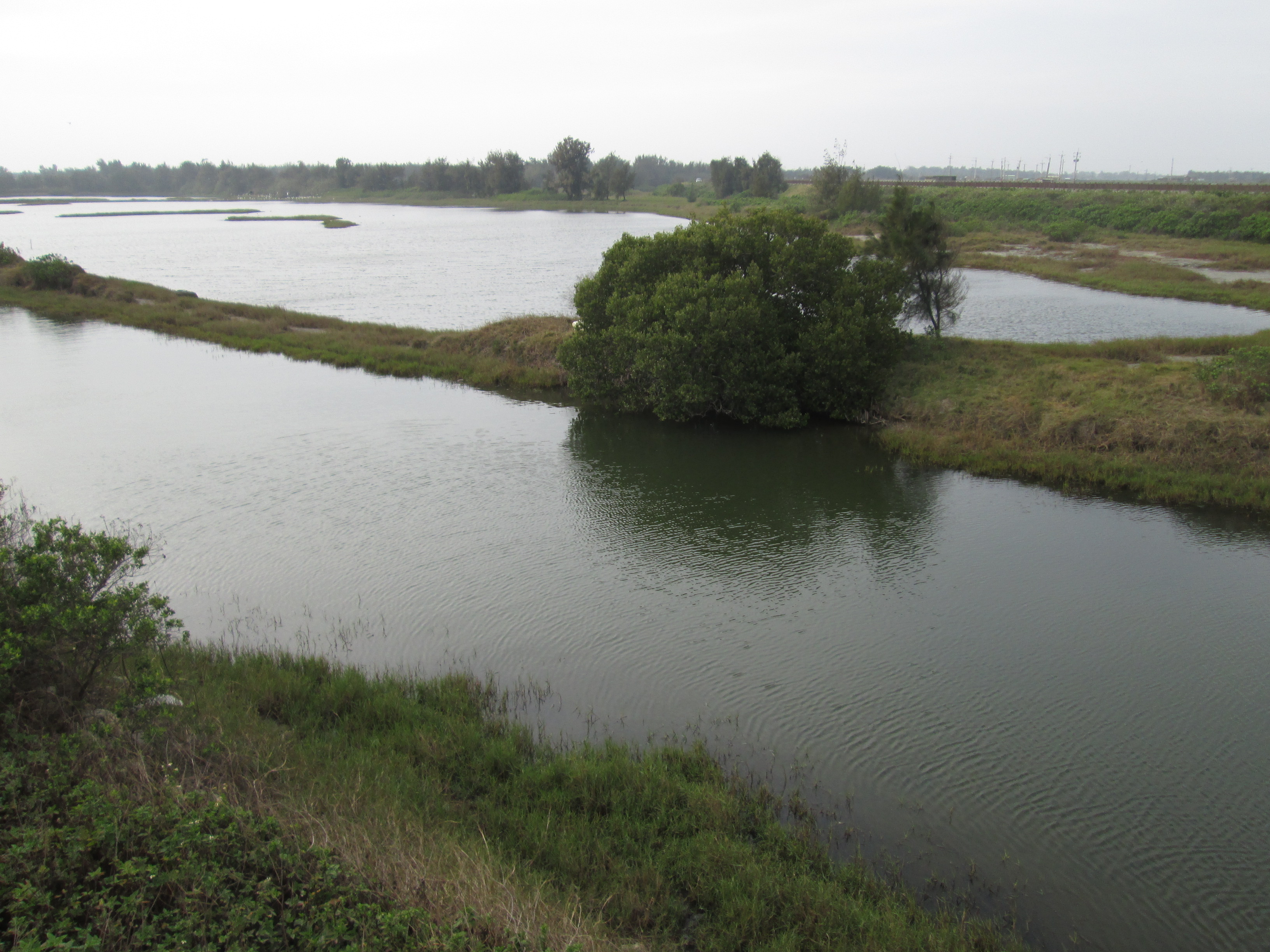 嘉義縣東石鄉 鰲鼓溼地